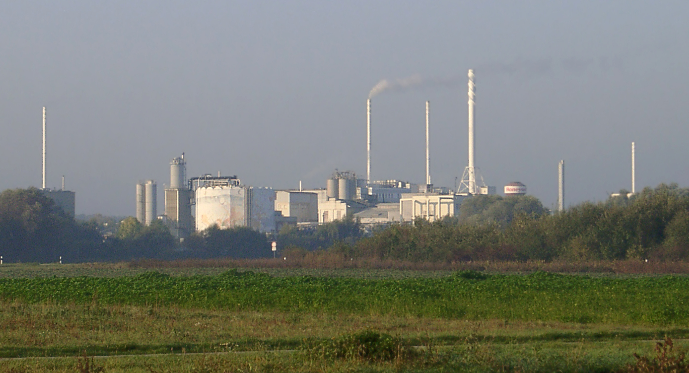 Chemiefabrik in Seelze, damals Riedel-de-Haen, heute Honeywell.